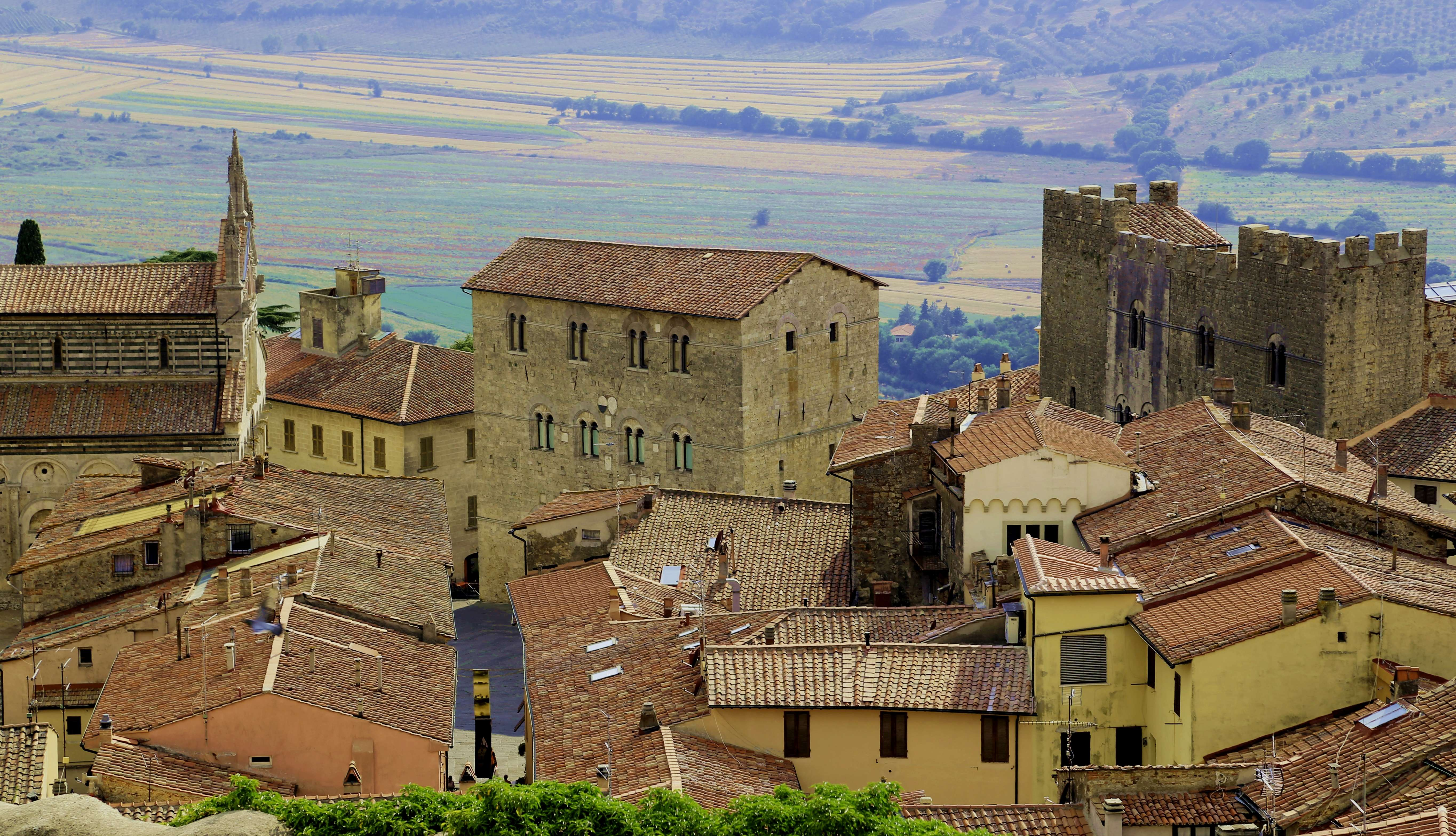 Centro storico di Massa Marittima (Duomo, Palazzo del Podestà, Palazzo del Comune); Veduta dall'alto con sfondo della campagna